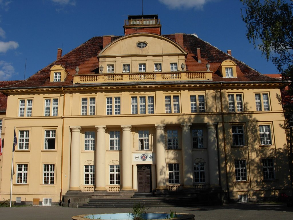 Gmach Pomorskiego Okręgu Wojskowego w Bydgoszczy